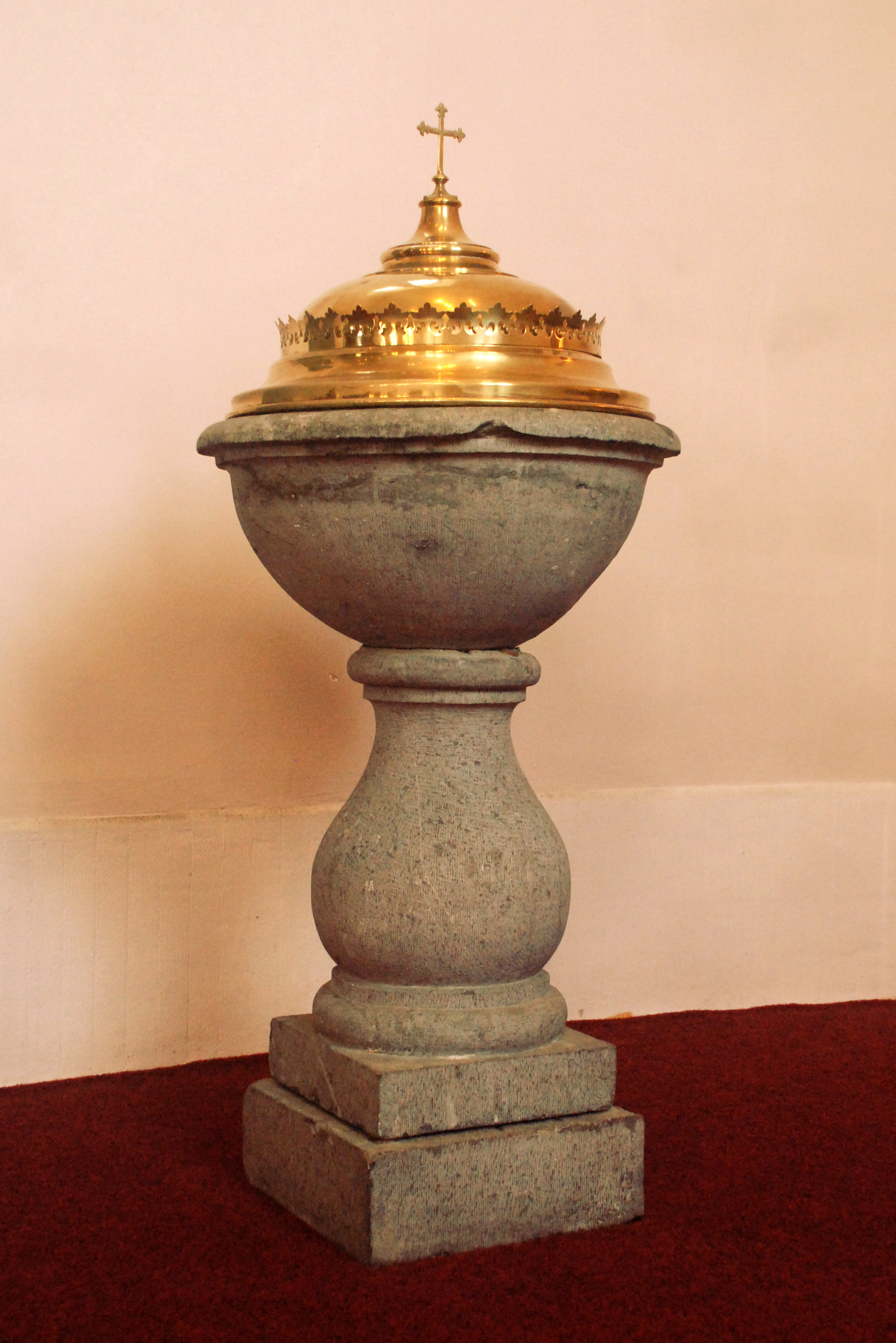 Belgique - Brabant wallon - Chastre - Cortil-Noirmont - Église Saint-Pierre de Noirmont